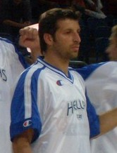 Theodoros Papaloukas im Juli 2008